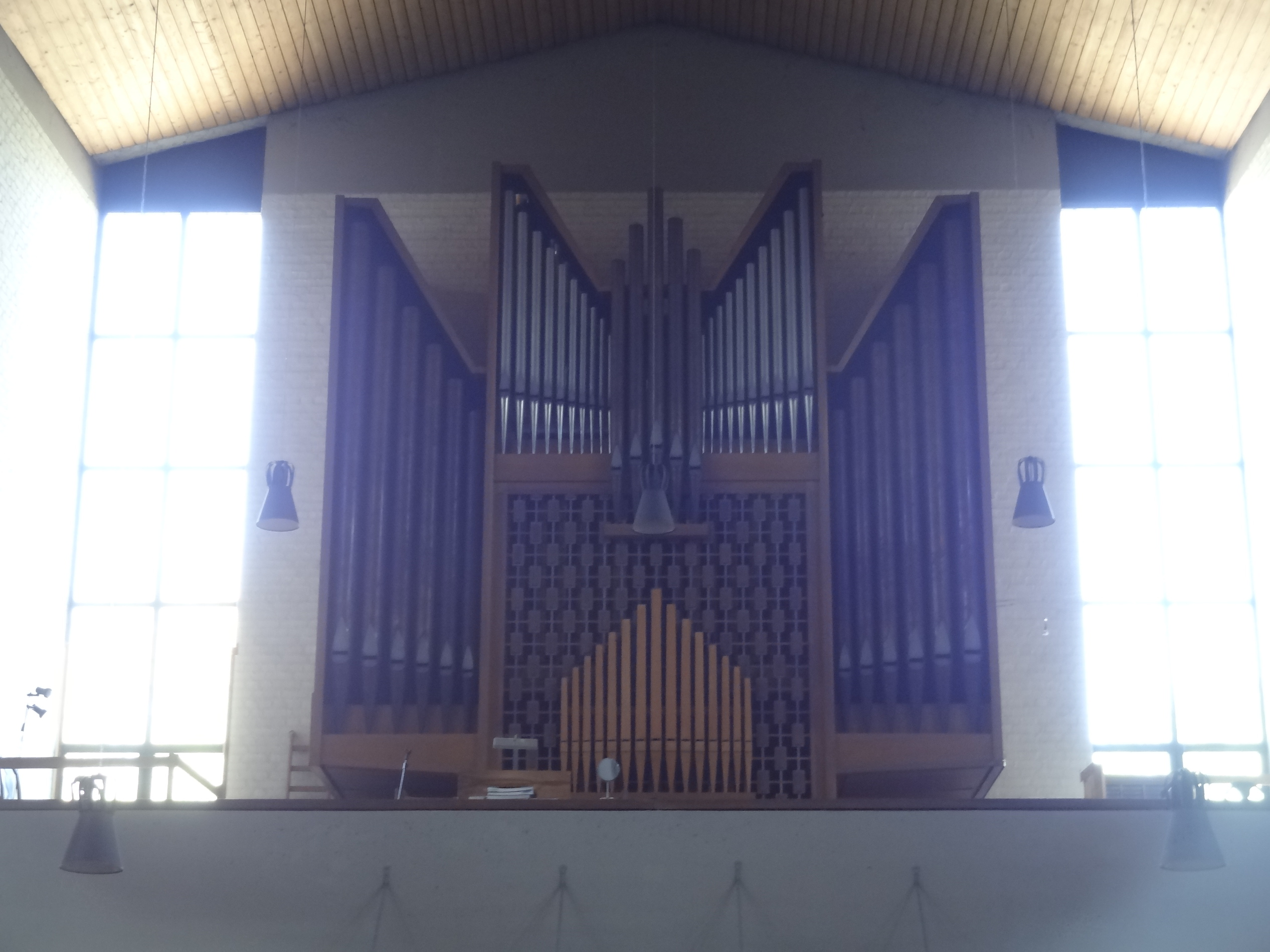 Orgel der Pfarrkirche St. Pius in Landshut